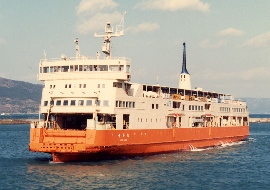 JR四国 宇高連絡船 伊予丸